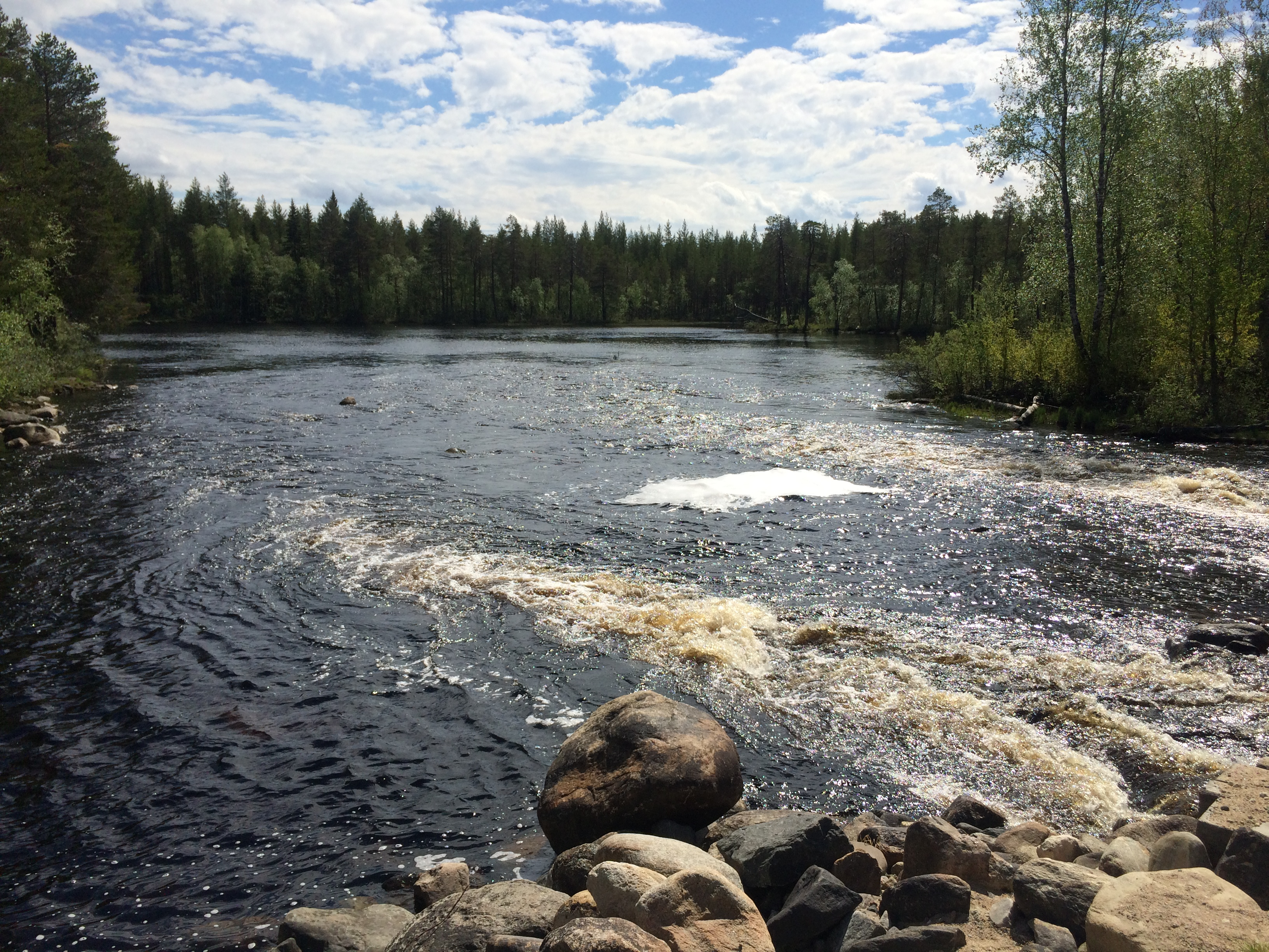 река Ледма